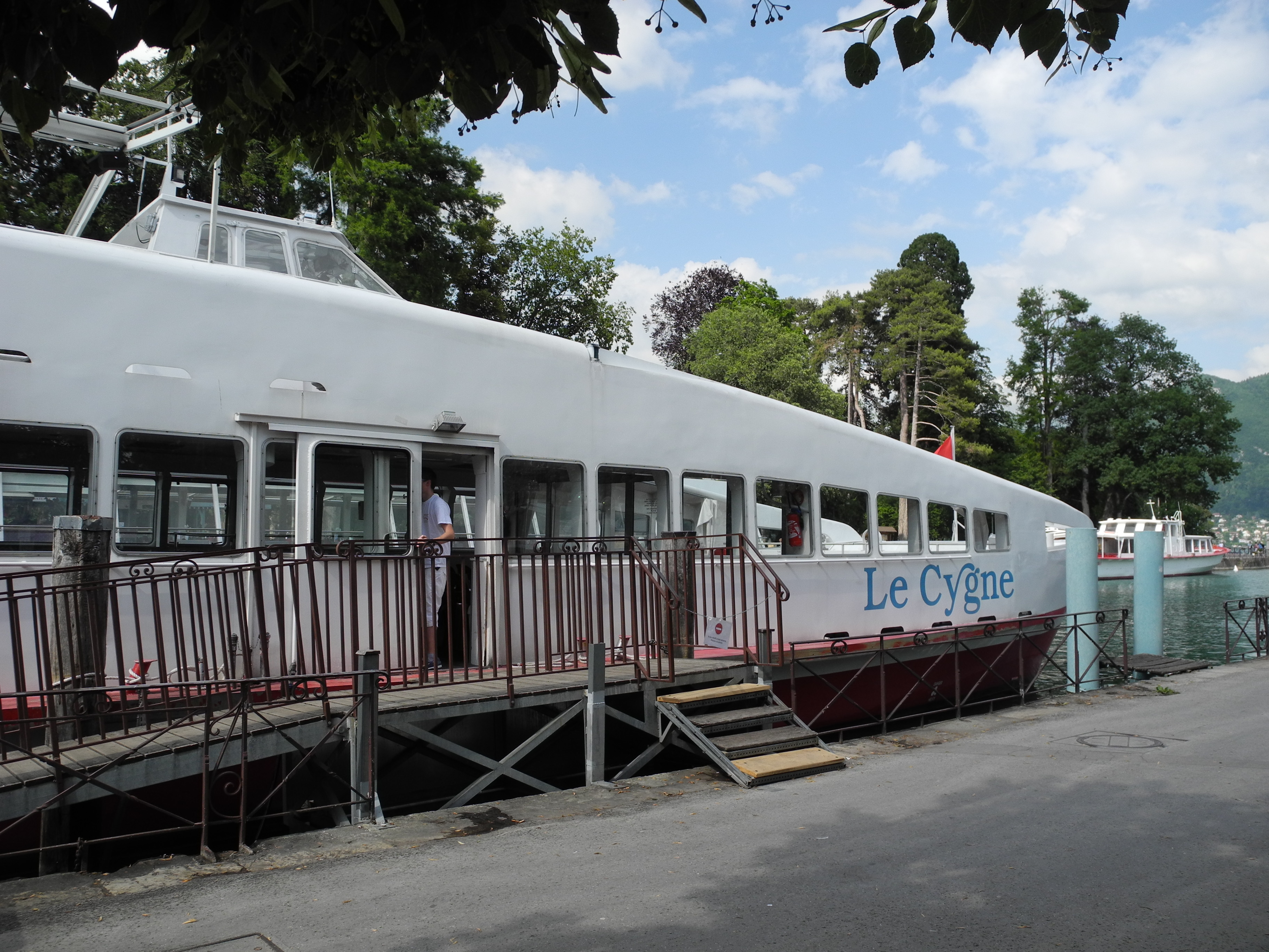 Bateau de croisière et de promenade sur le lac d'Annecy